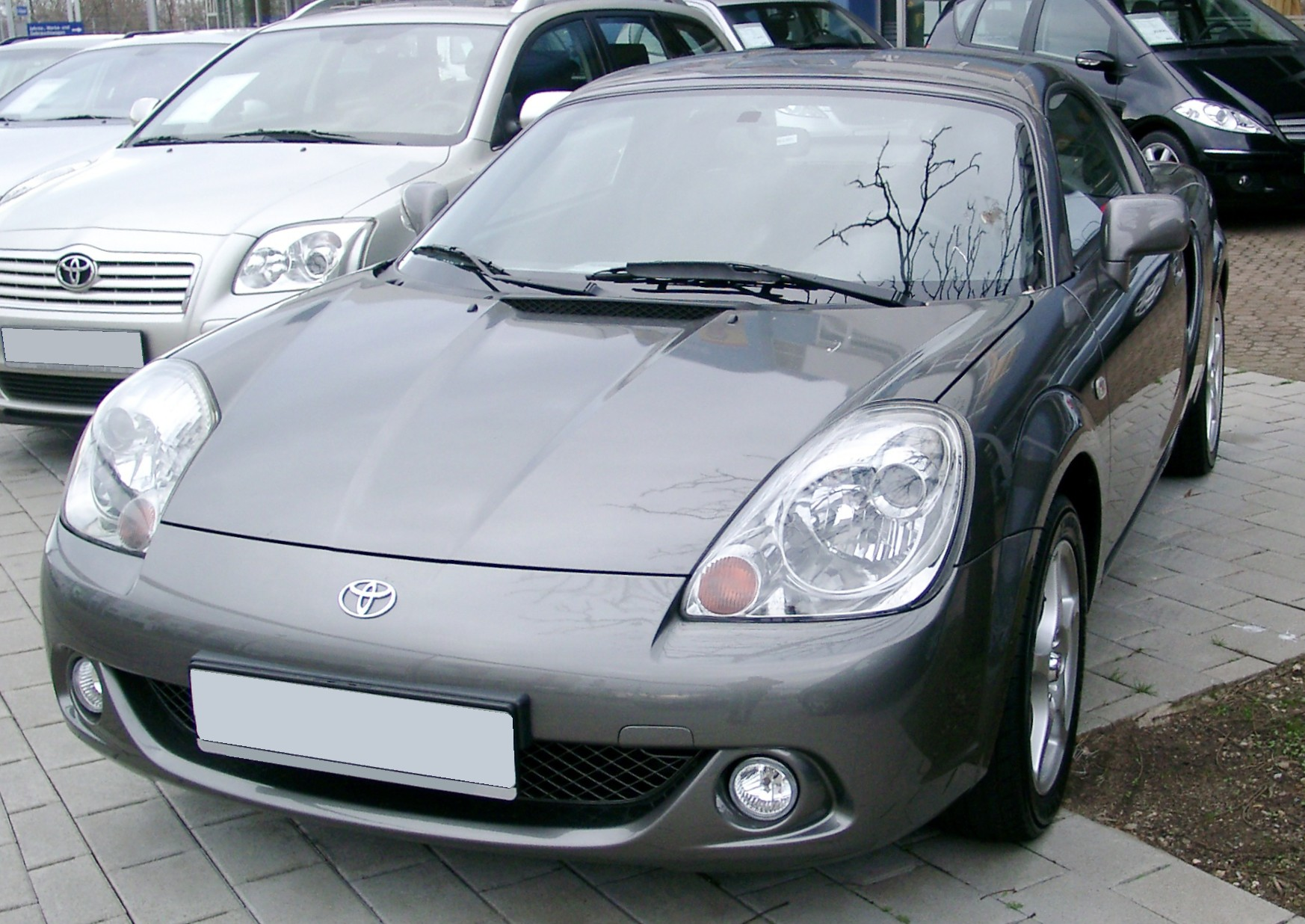 Toyota MR2 W3